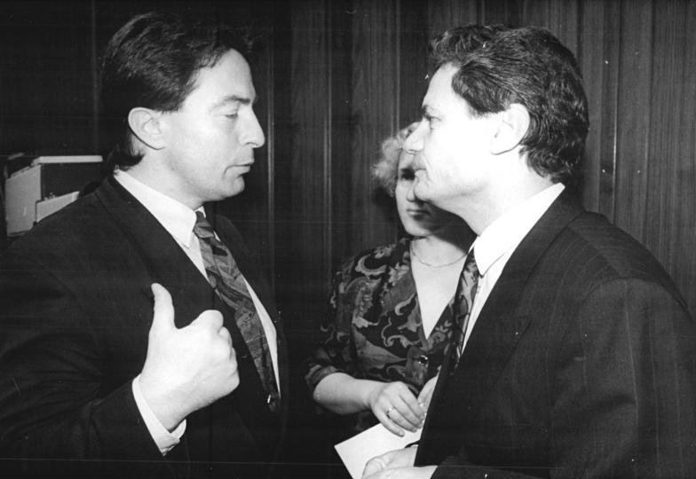 ADN/Peer Grimm/ 28.9.90 Berlin: 37. Tagung Volkskammer Mit großer Mehrheit wählte am Freitagvormittag die DDR-Volkskammer Joachim Gauck (r) als Sonderbeauftragten der Bundesregierung für die Verwahrung der Akten und Dateien des ehemaligen Ministeriums für Staatssicherheit - Amtes für Nationale Sicherheit. (l: Innenminister Peter-Michael Diestel)